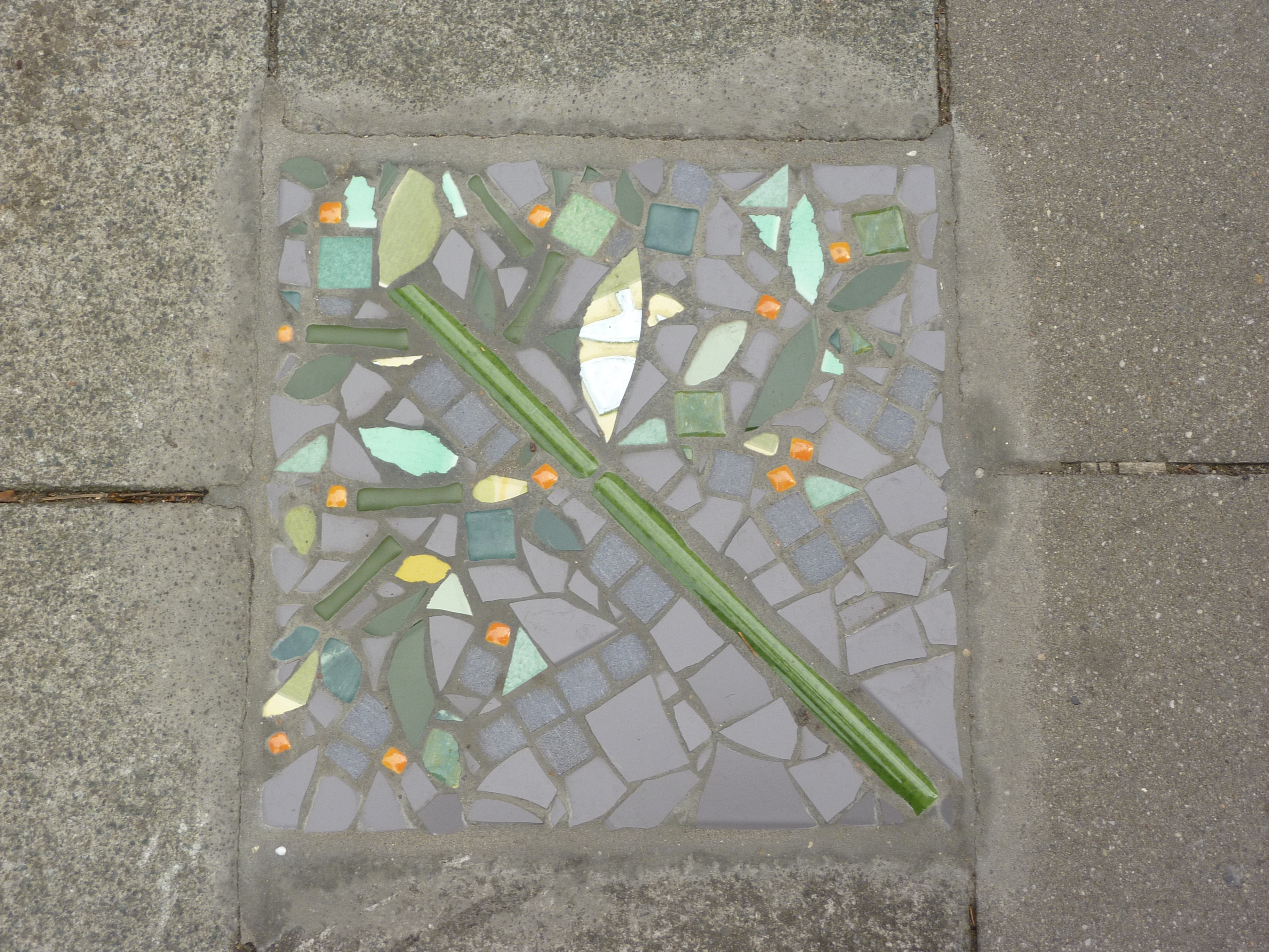 Mosaïque (30x30cm) remplaçant une dalle du trottoir au numéro 27 de l'avenue Georges Eekhoud à Schaerbeek, Bruxelles, Belgique.